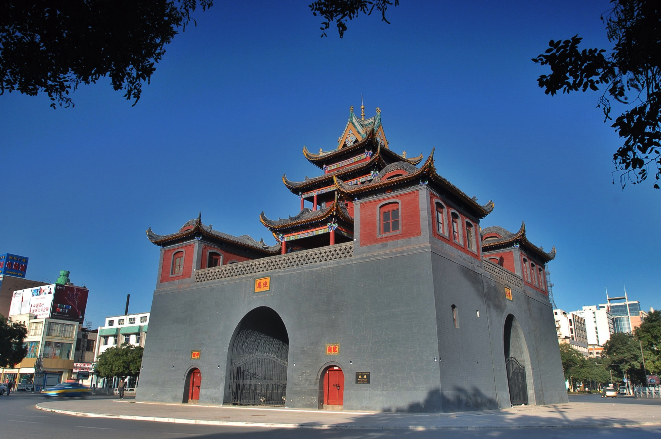 標題錯誤，此爲銀川鼓樓，并非中衛鼓樓。